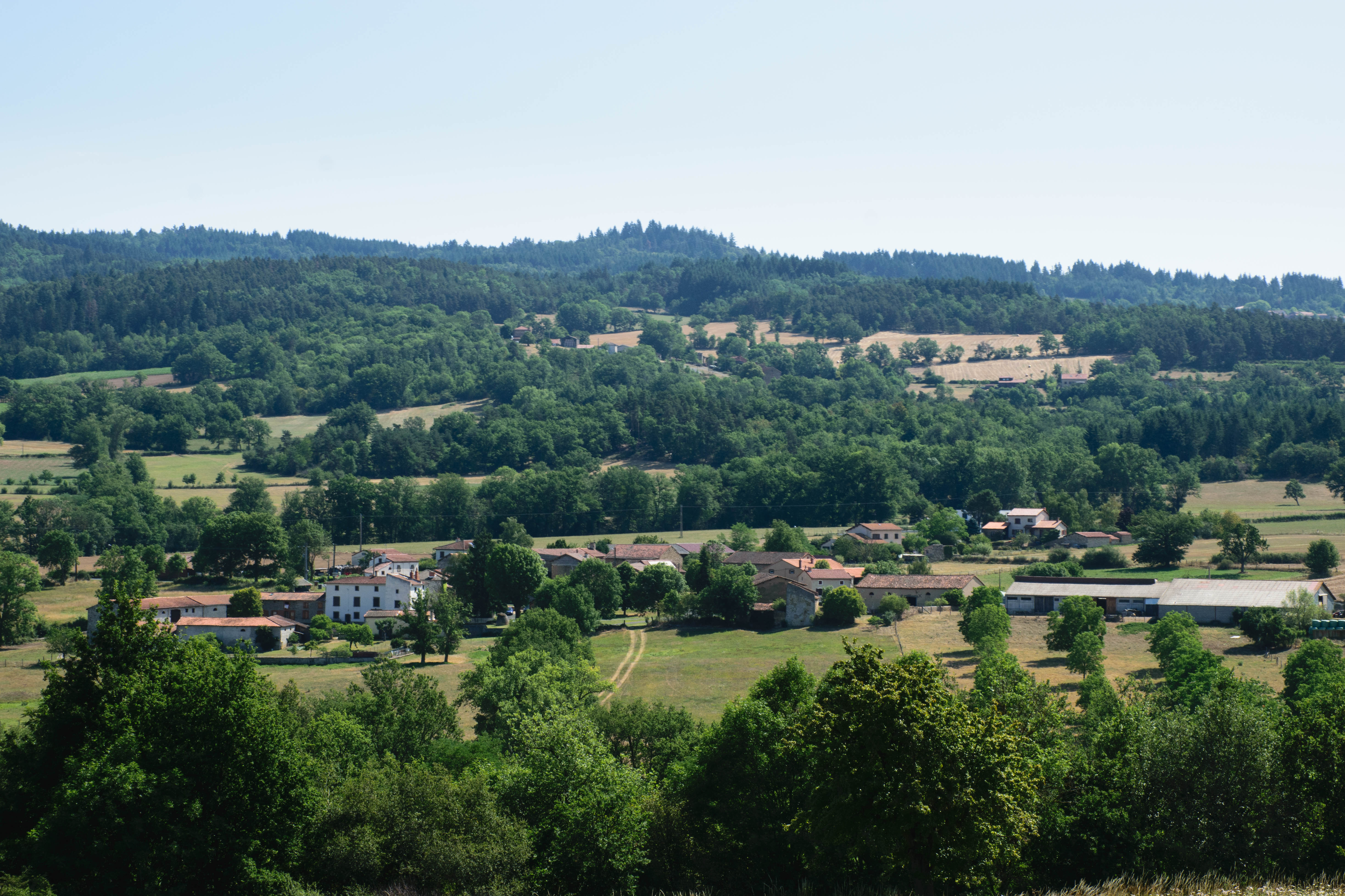 Le Chariol, hameau de la commune de Frugières-le-Pin (Haute-Loire, France).